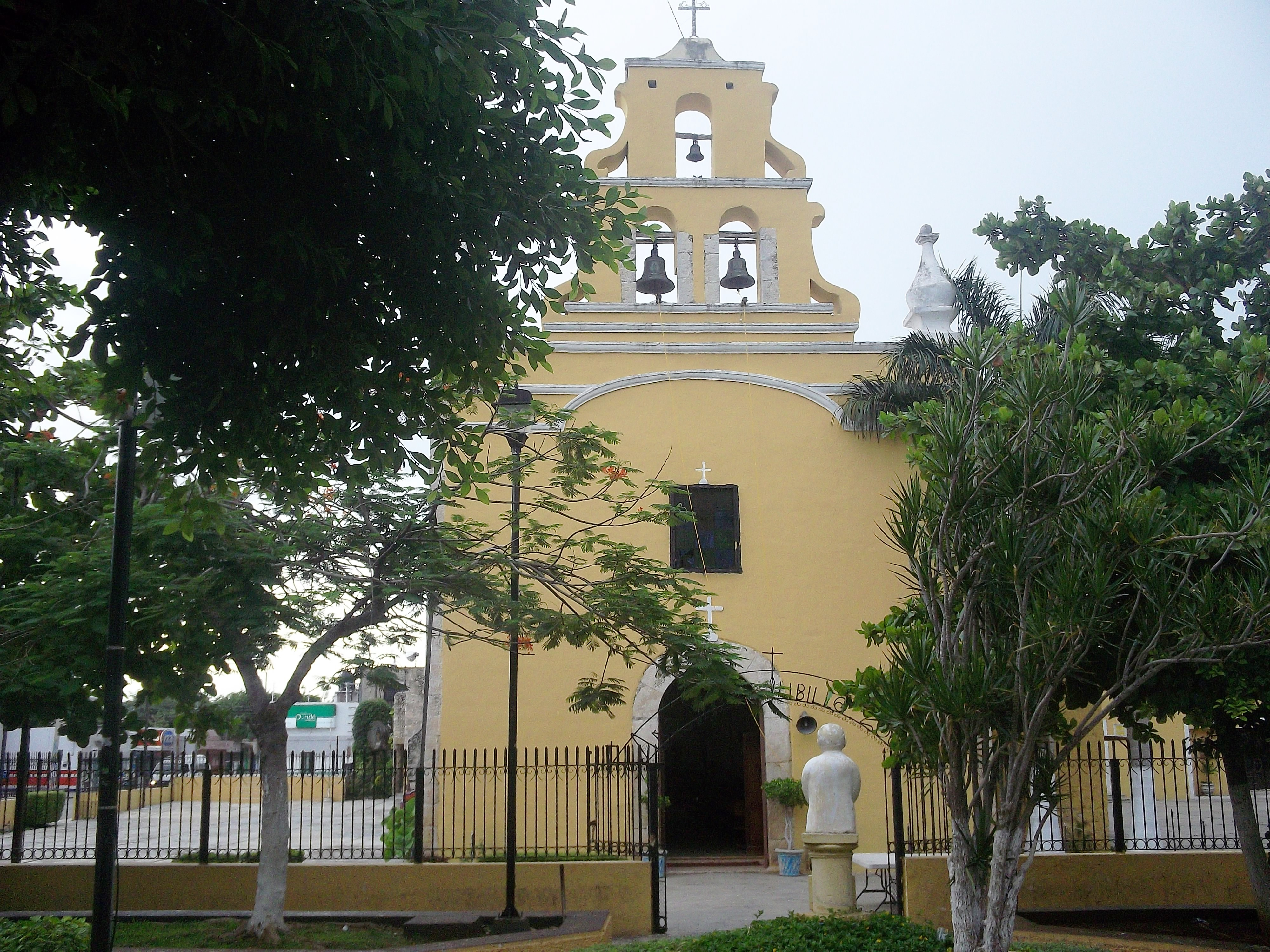 Iglesia principal de Kanasín, Yucatán.